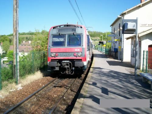 Vue du terminus Saint-Martin-d'Etampes